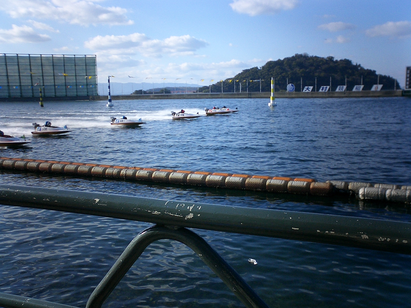 大村競艇